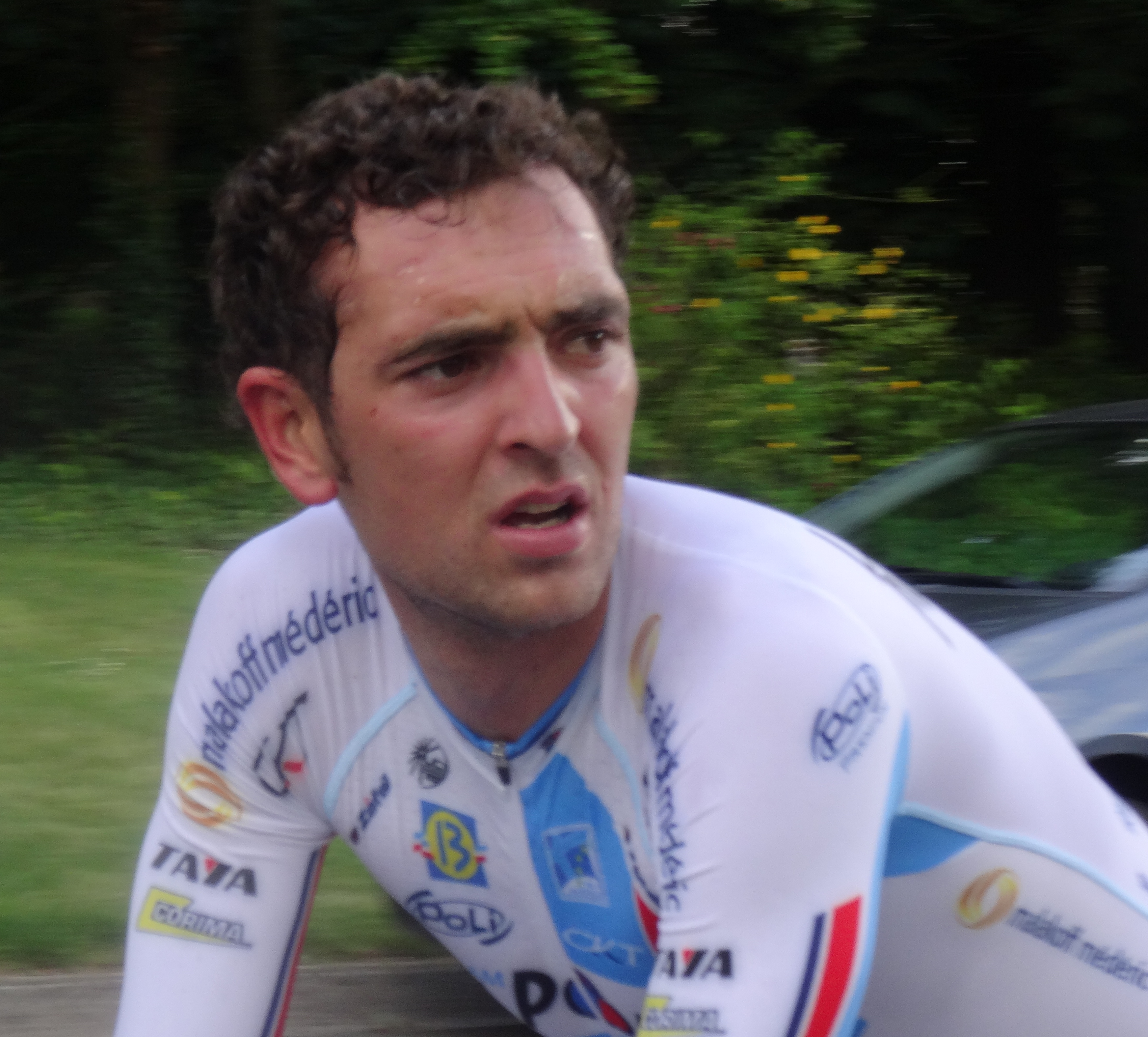 Reportage photographique réalisé le vendredi 23 mai 2014 à l'occasion de l'arrivée de la première étape du Paris-Arras Tour 2014 devant la citadelle d'Arras, Pas-de-Calais, Nord-Pas-de-Calais, France. Depicted person: Thomas Vaubourzeix